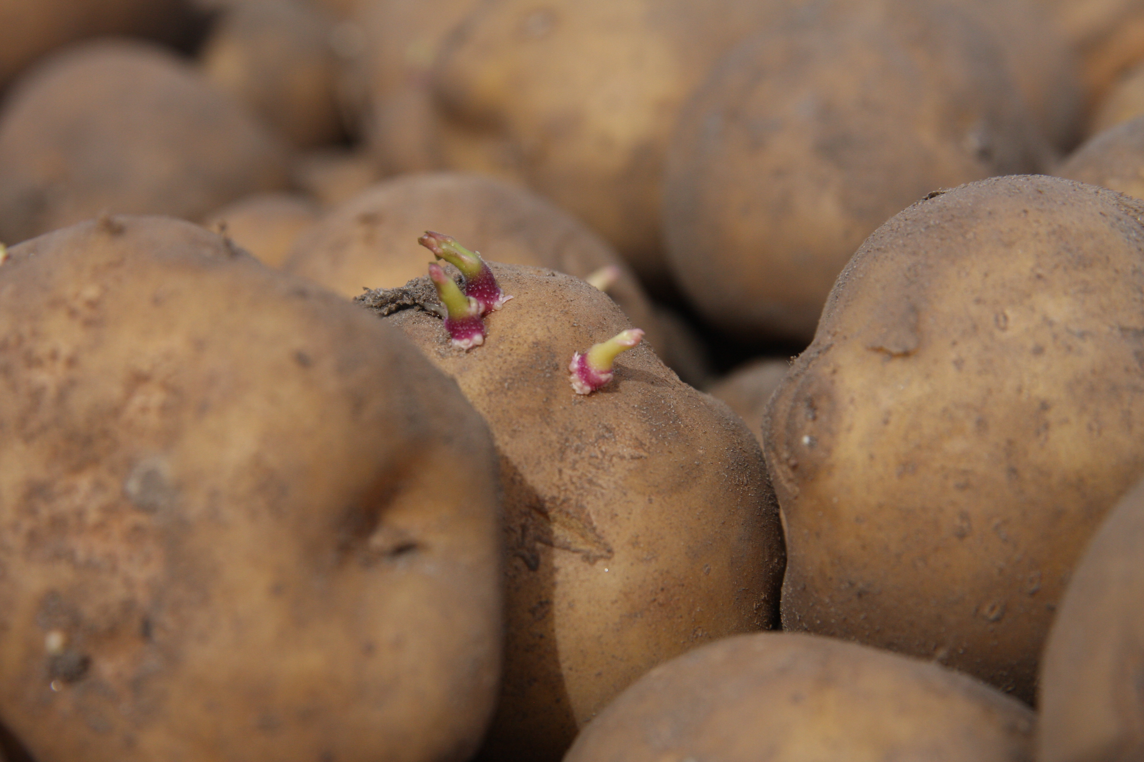 Amflora-Auspflanzung im Feldversuchsanbau 2008 in Schweden. Amflora ist die erste gentechnisch optimierte Pflanze, die seit 1998 in der EU eine kommerzielle Anbau-Zulassung erhalten hat. BASF-Forscher haben sie gemeinsam mit Experten der Stärkeindustrie entwickelt, um technische Anwendungen zu erleichtern.